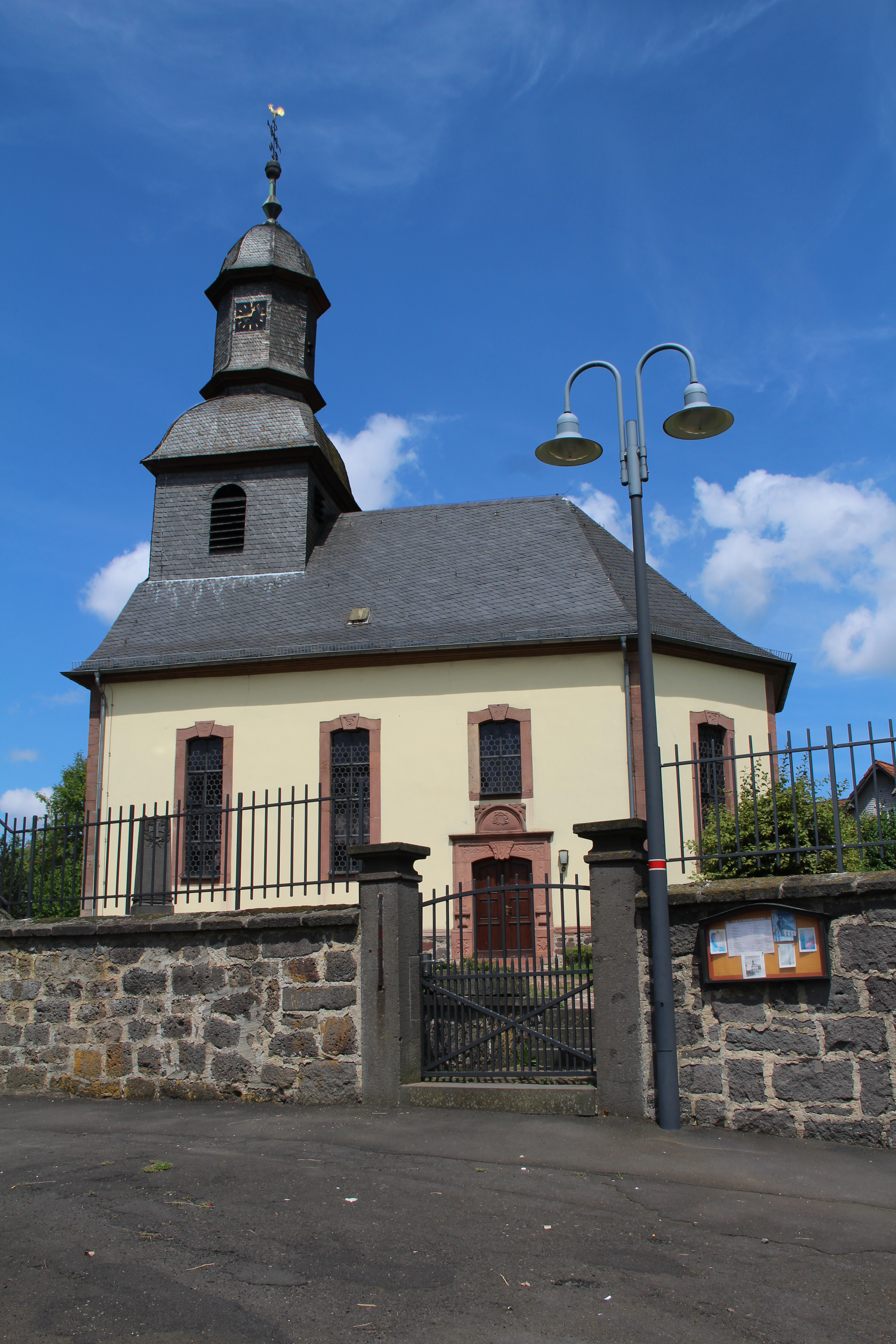 Evangelische Kirche Rüddingshausen (Rabenau)